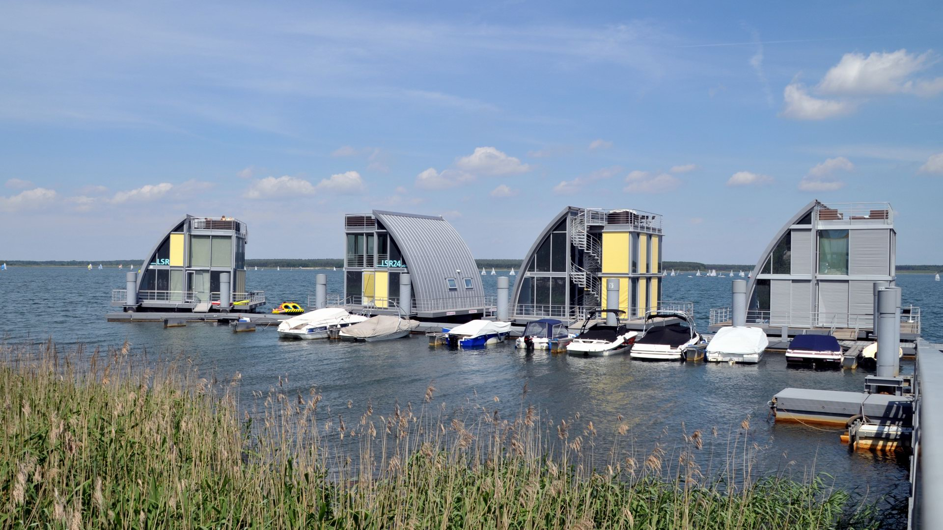 Schwimmendes Dorf Scado am Geierswalder See